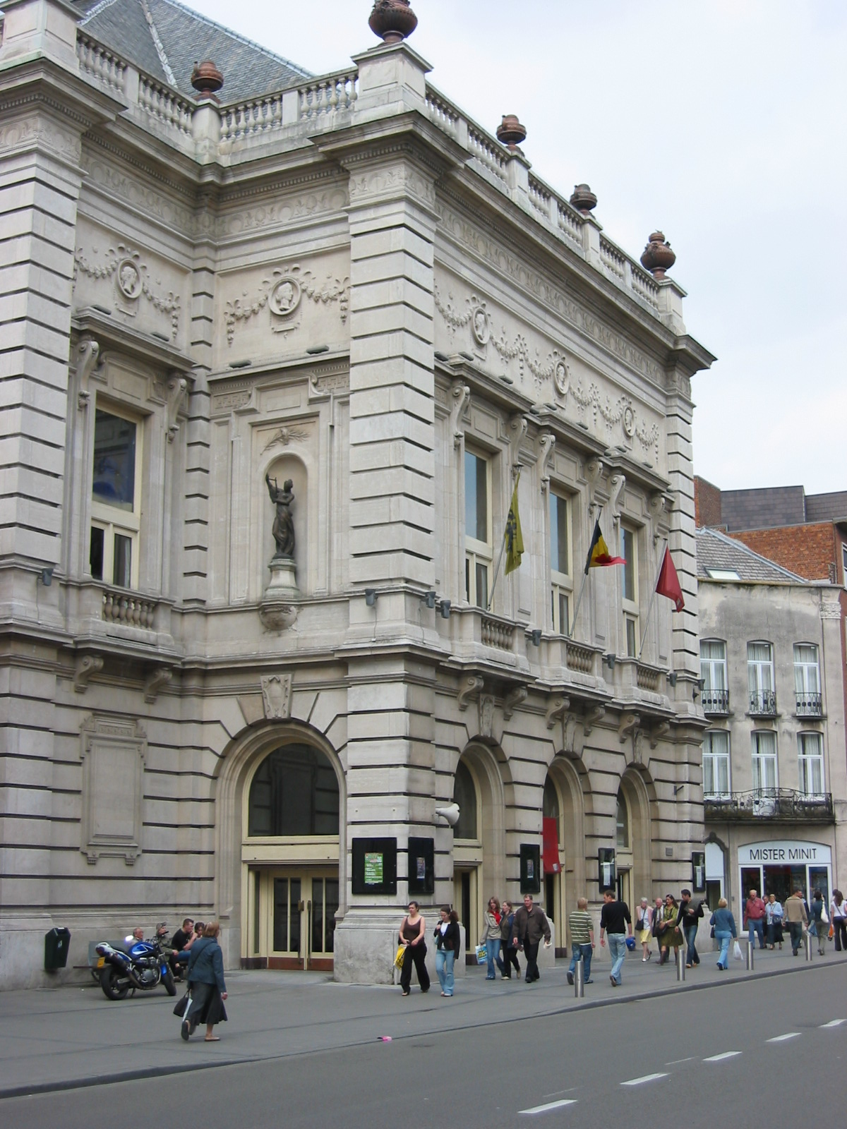 De Schouwburg van het cultuurcentrum op de Bondgenotenlaan in Leuven. (Gemaakt in juni 2006)